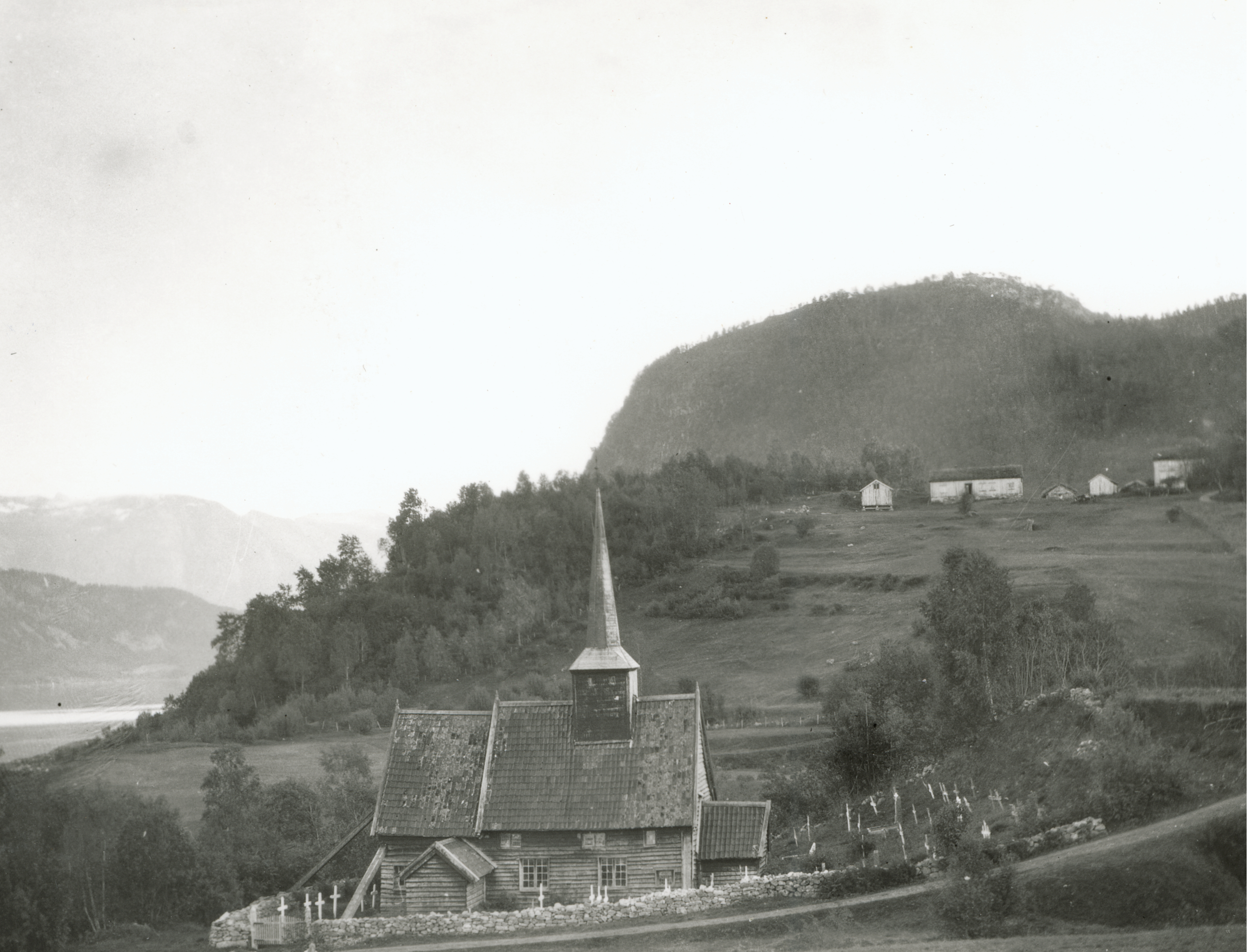 Rødven stavkirke i Holm, Møre og Romsdal Oversikt. Sett fra nord